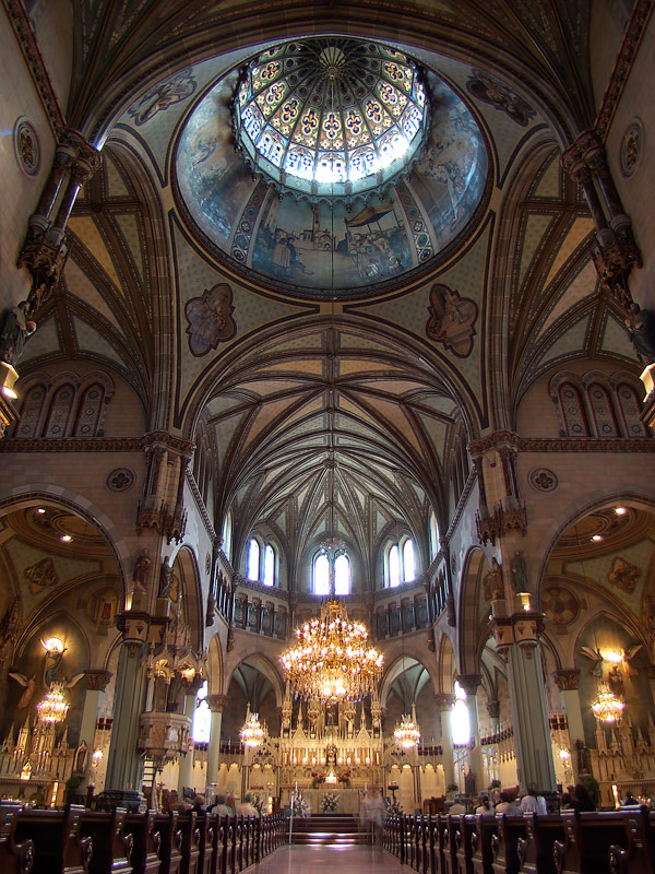 Cocathédrale Saint-Antoine-de-Padoue, Longueuil, Montérégie, Québec, Canada.